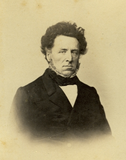 Ludwig Strümpell, saksa filosoof